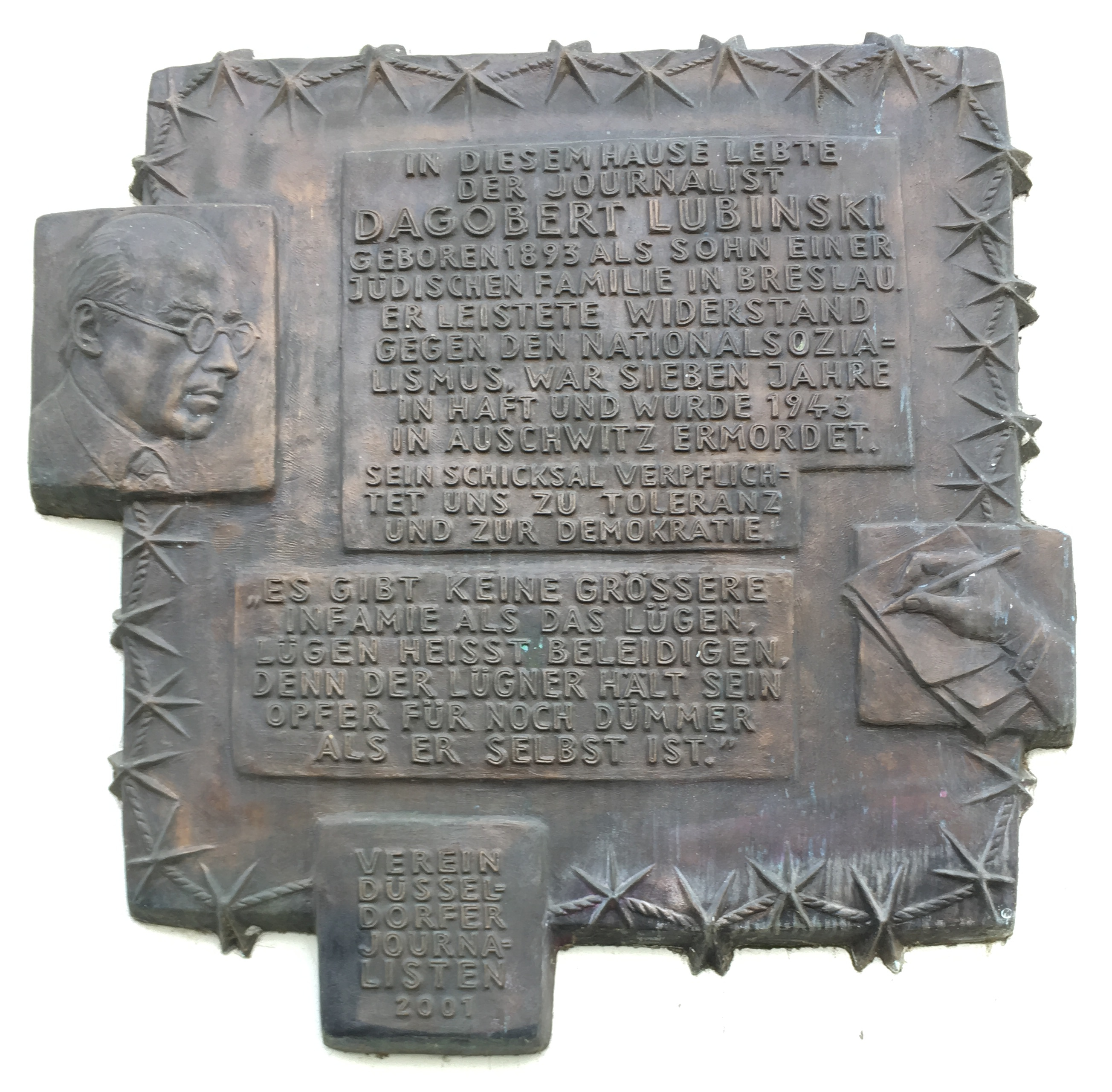 Gedenktafel aus Bronze. Text: In diesem Hause lebte der Journalist Dagobert Lubinski geboren 1983 als Sohn einer jüdischen Familie in Breslau. Er leistete Widerstand gegen den Nationalsozialismus, war sieben Jahre in Haft und wurde 1943 in Auschwitz ermordet. Sein Schicksal verpflichtet uns zu Toleranz und zur Demokratie. „Es gibt keine grössere Infamie als das Lügen. Lügen heisst Beleidigen, denn der Lügner hält sein Opfer für noch dümmer als er selbst ist.“ Verein Düsseldorfer Journalsisten 2001